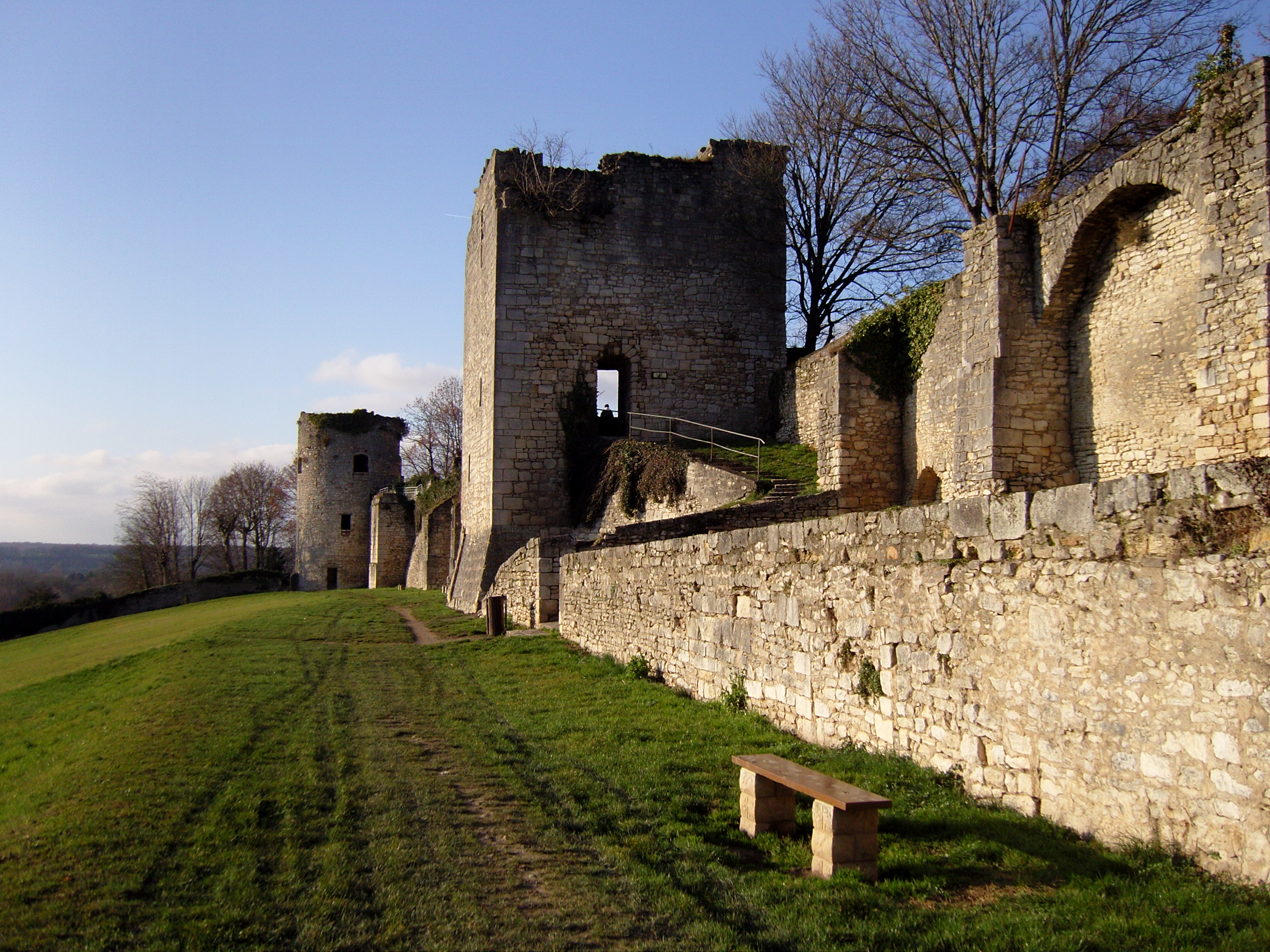 Les Remparts de La Charité-sur-Loire (Nièvre, France).